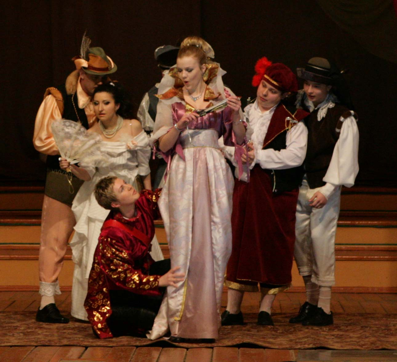 испанские страсти